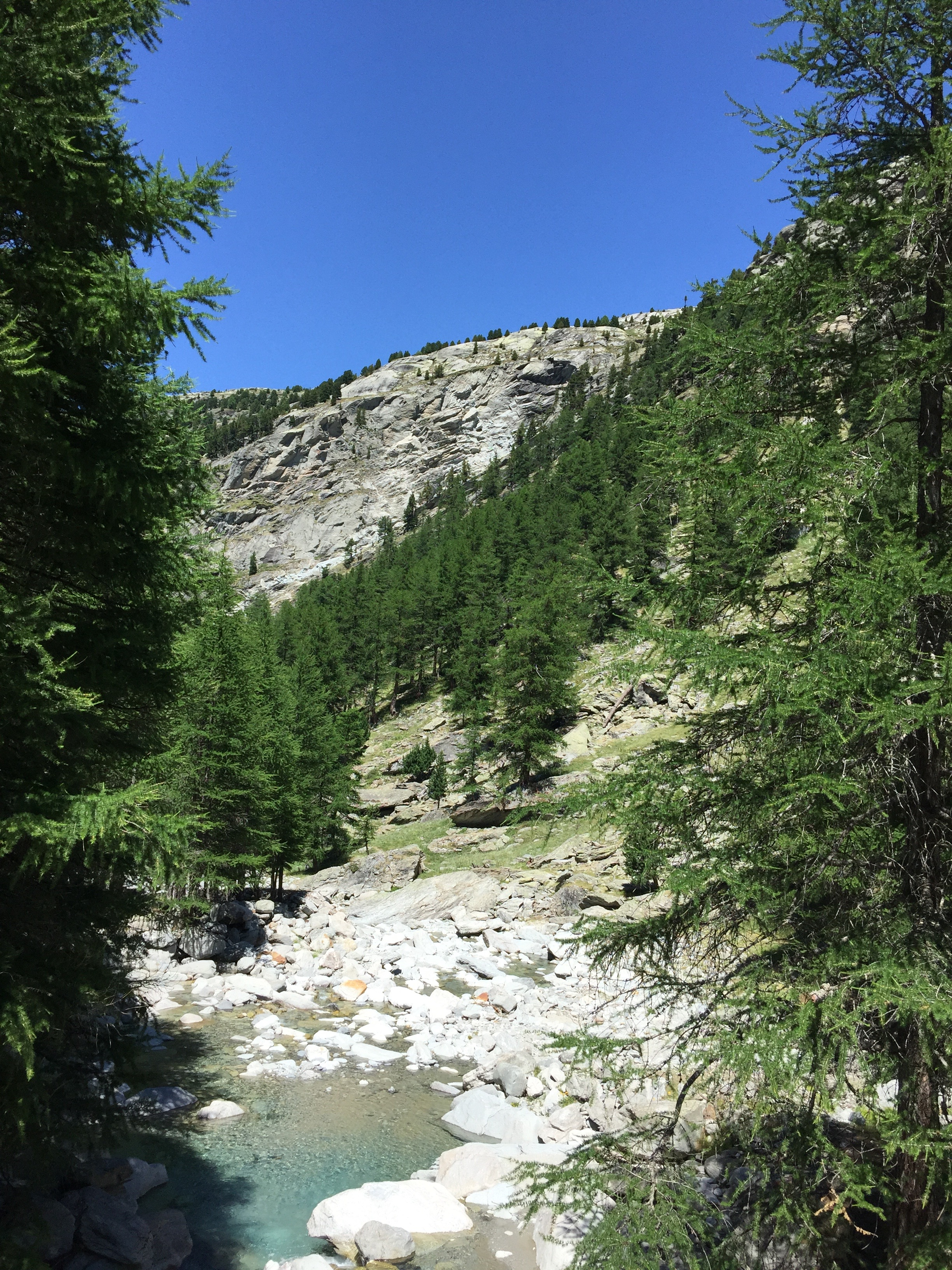 Le socle cristallin lorsqu'il affleure, est reconnaissable par sa forme compacte et aux lignes rondes caractéristiques